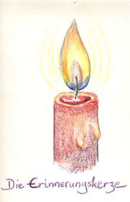 Erinnerungskerze, Lehrstück Faradays Kerze, Susanne Wildhirt